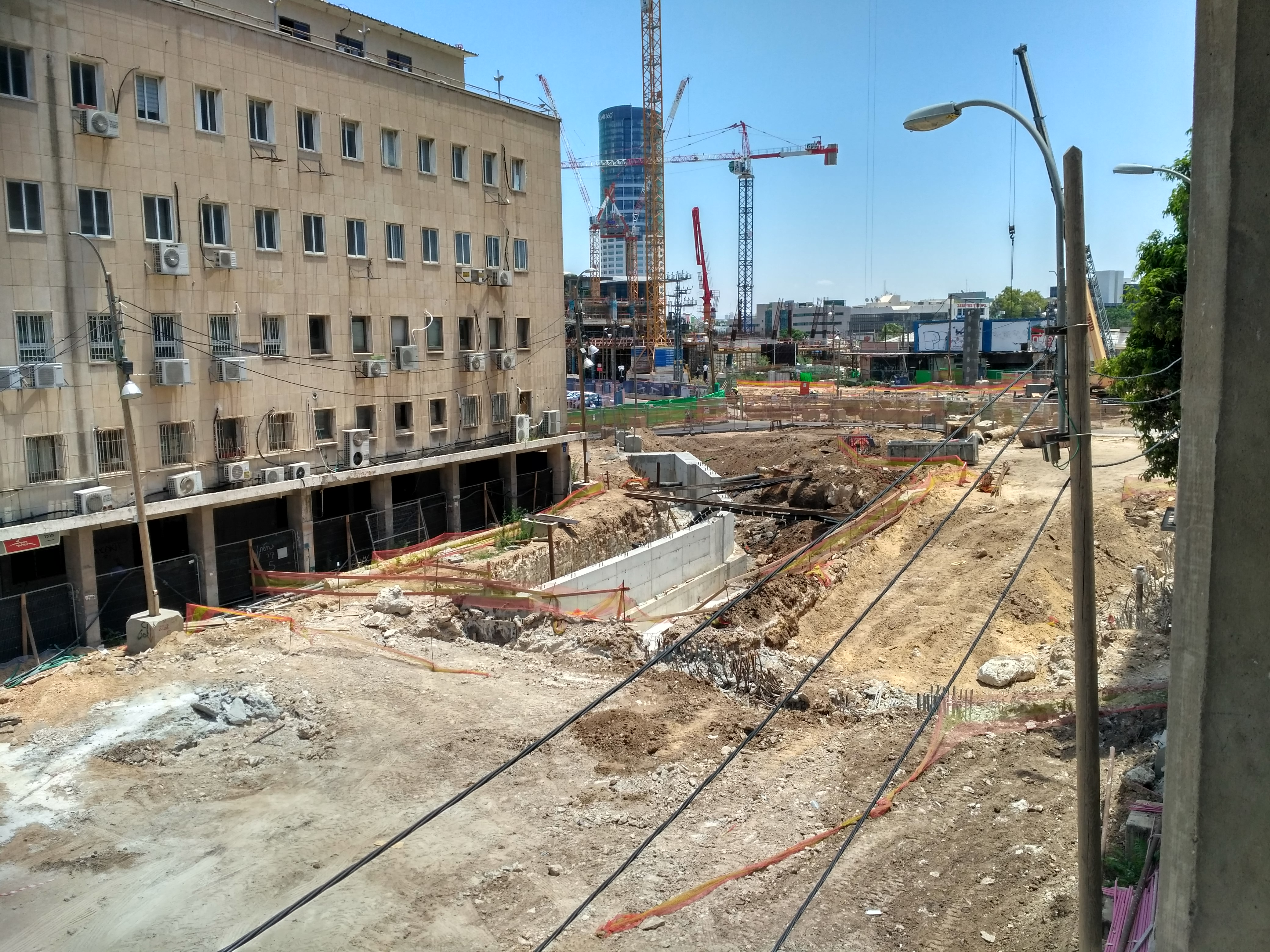 צומת מעריב לאחר פיצוץ גשר מעריב ניתן לראות את העבודות על הרכבת הקלה